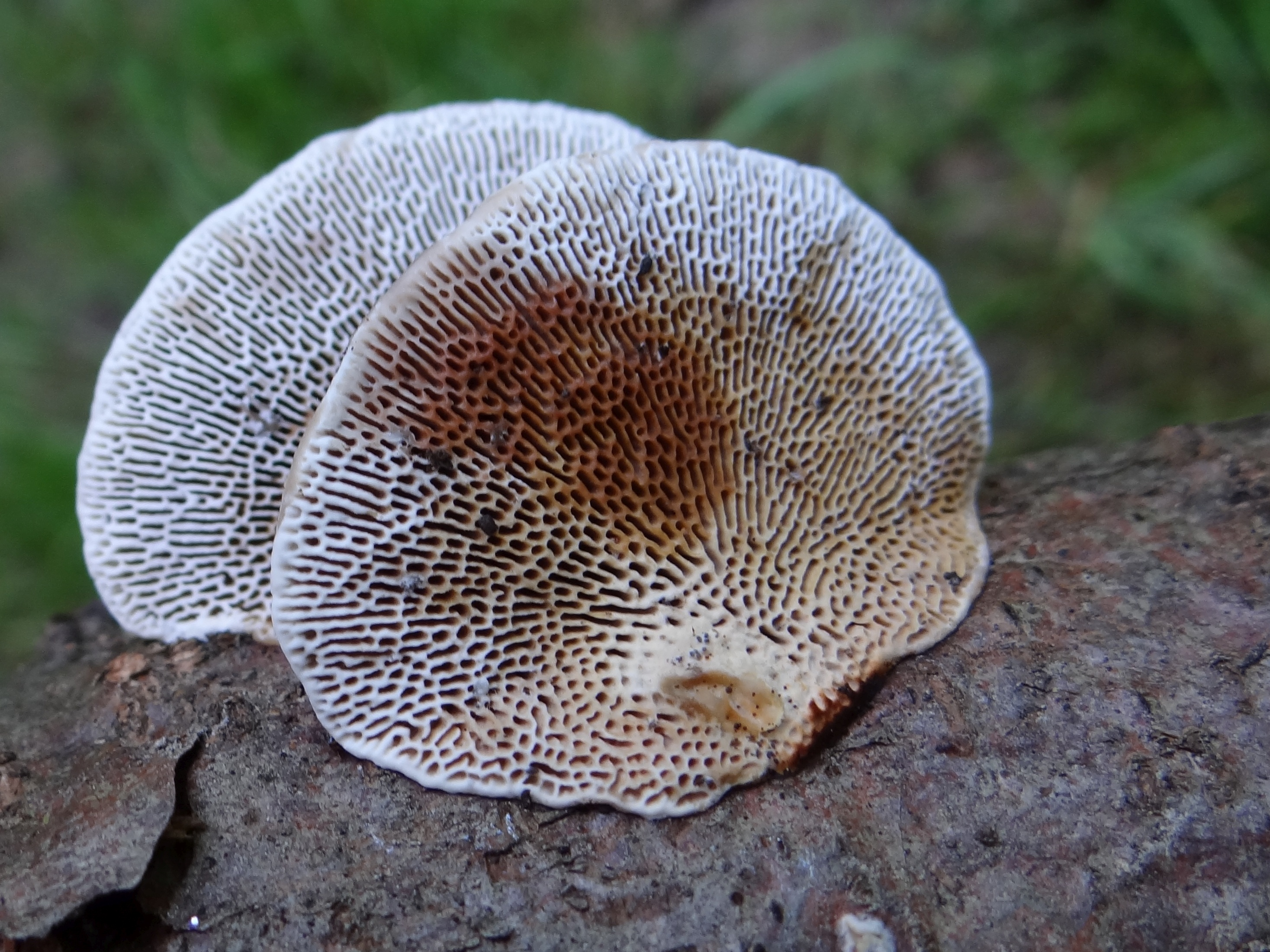 Daedaleopsis confragosa (location: Poland, Pogórze Wiśnickie)